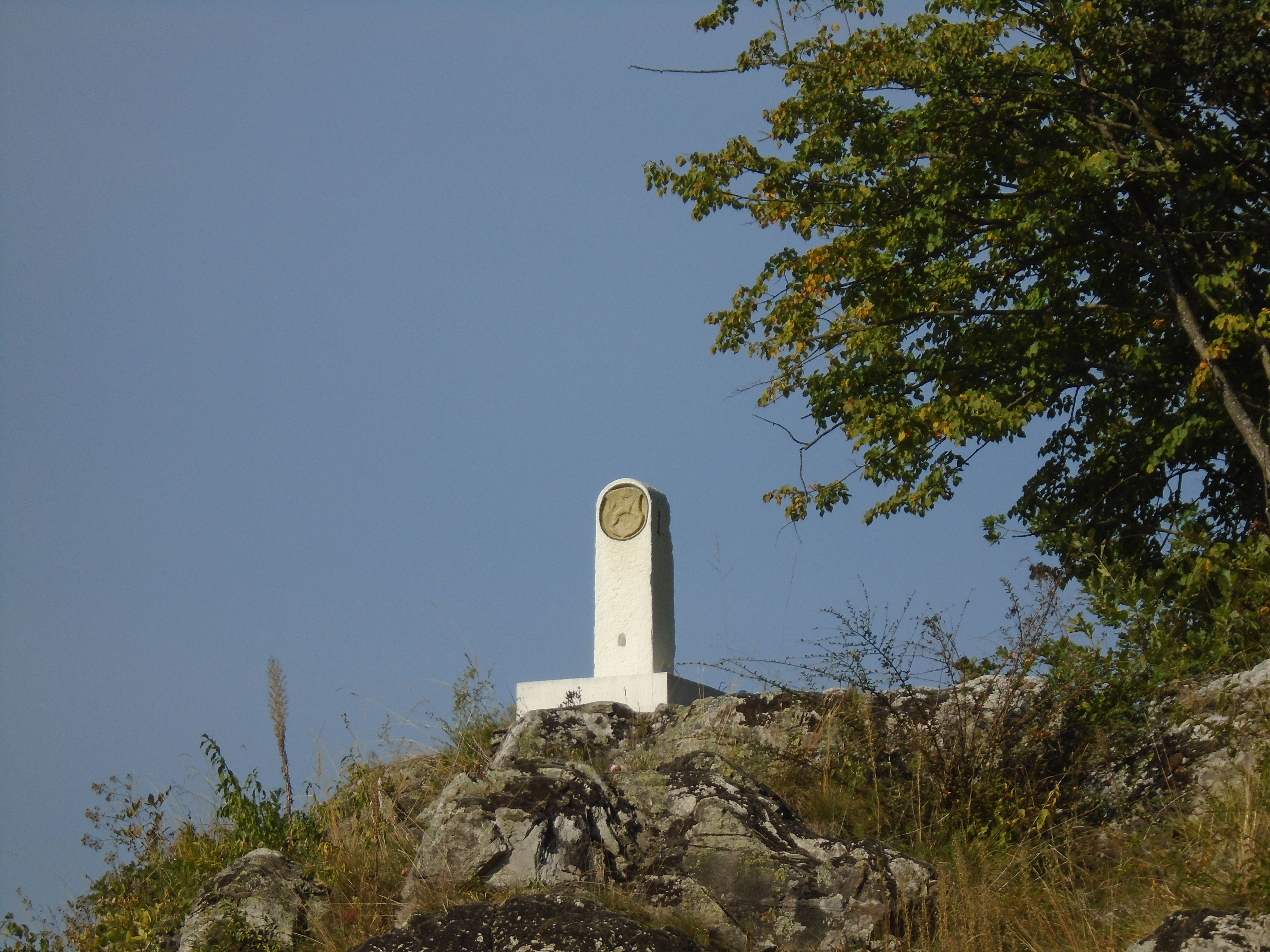 Kräutelstein, Donauinsel unterhalb von Passau, vom Leitdamms aus Richtung Grenzstein (bayerische Seite) gezoomt